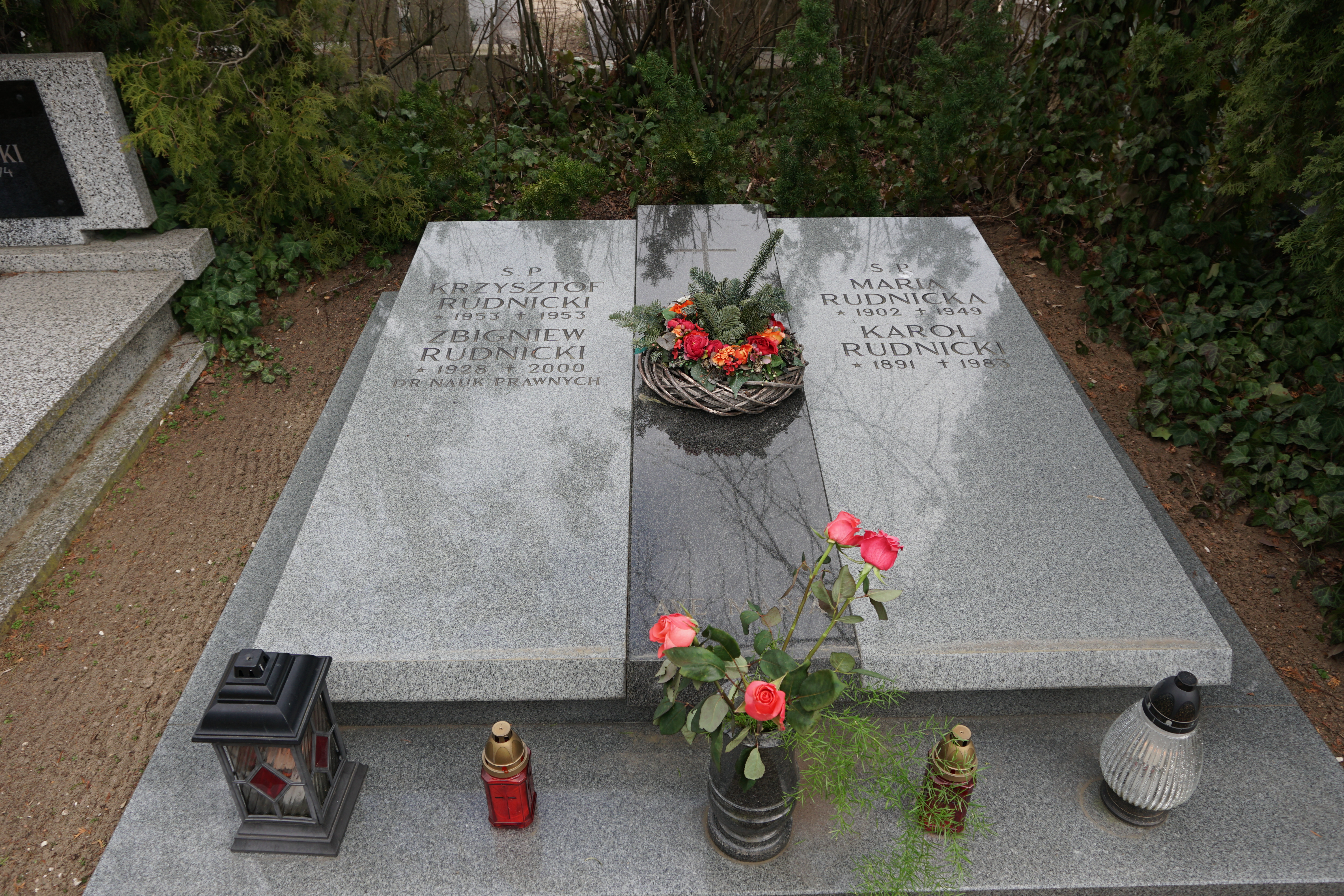 grób Zbigniewa Rudnickiego na Cmentarzu Junikowskim